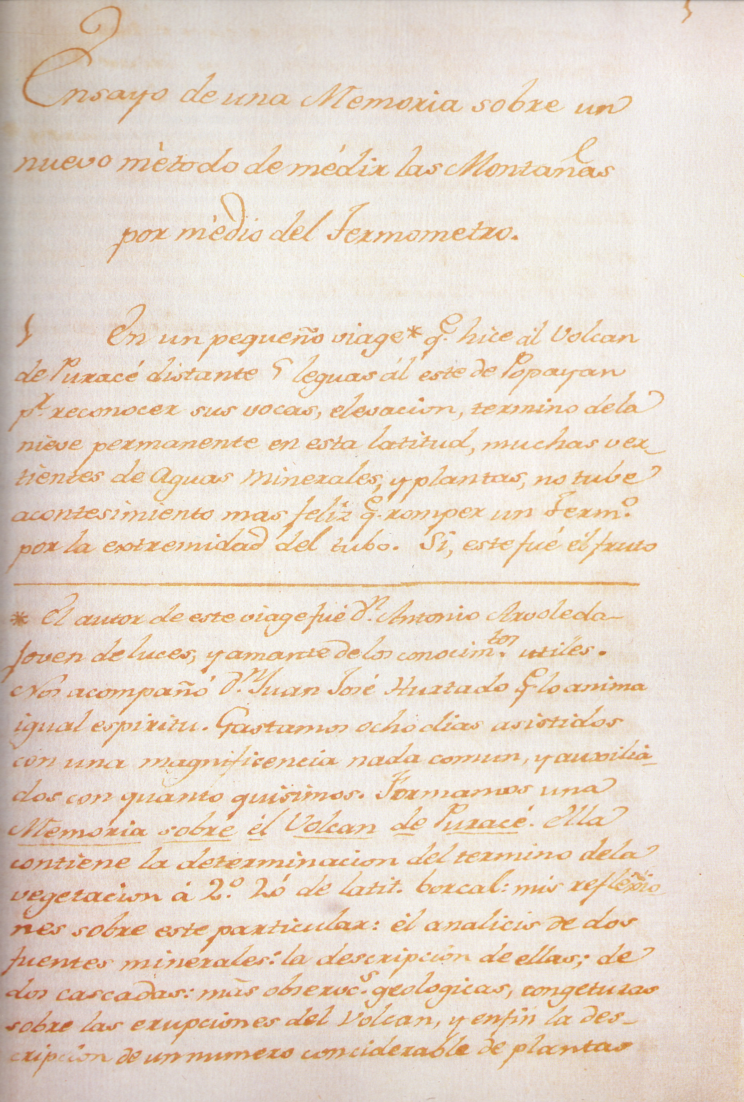 Esta Memoria se publicó por primera vez en Europa después de la muerte de Caldas.El autor de este viaje fue don Antonio Arboleda, joven de luces y amante de los conocimientos útiles. Restituido a Popayán Caldas escribe este ensayo tras las observaciones realizadas con don Antonio Arboleda y don Juan José Hurtado en el volcán Puracé en donde por accidente se rompe el termómetro circunstancia que le permite desarrollar un nuevo método para medir las montañas mediante este instrumento y el agua hirviendo. De este manuscrito se hallan dos copias ambas de letra del sabio y en el relata su nuevo descubrimiento.